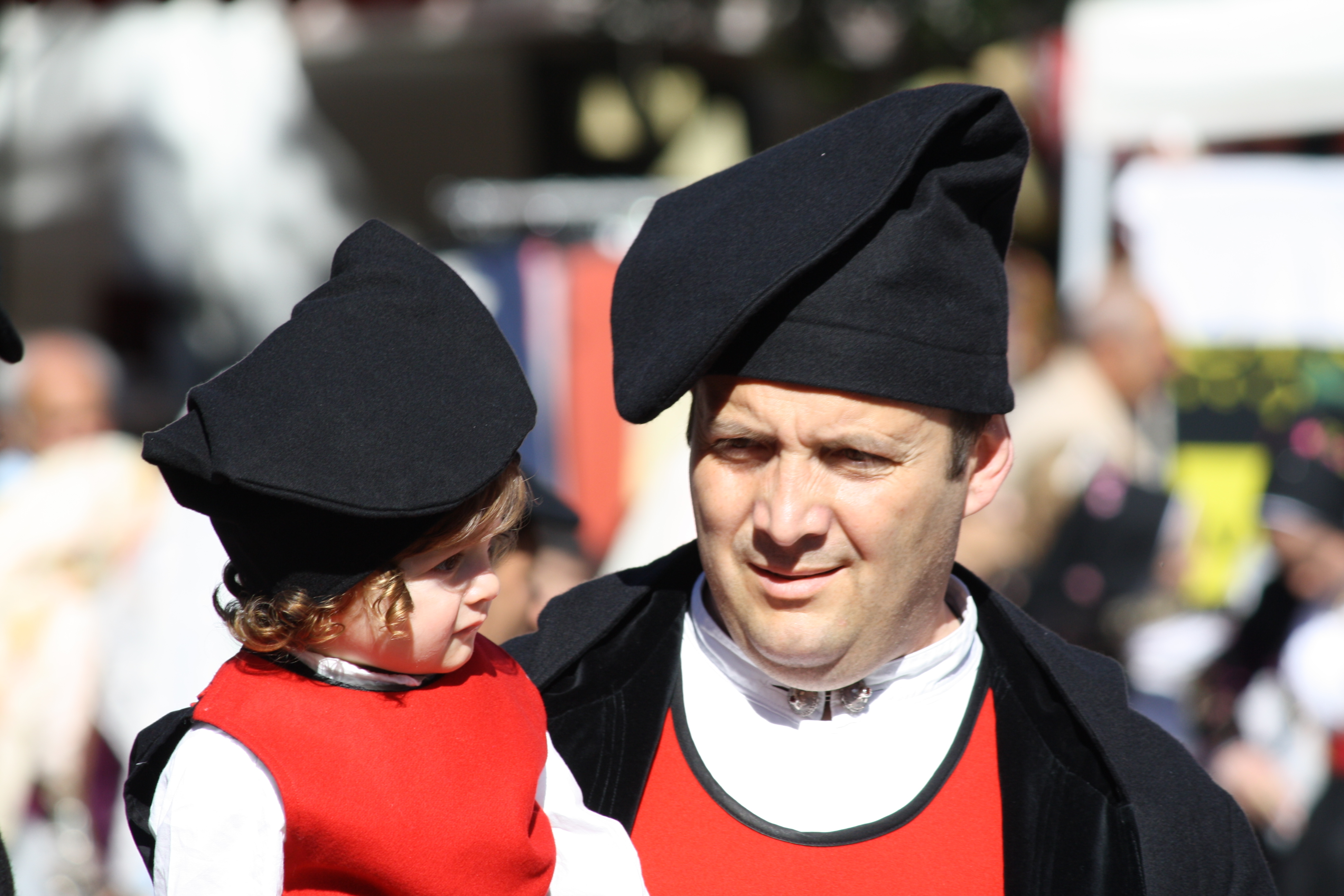 sardinian people sardinians sardi folk sardinia island sardegna sardinia sardaigne cerdeña sardinien abiti tradizionali costumi gente persone cavalcata sarda